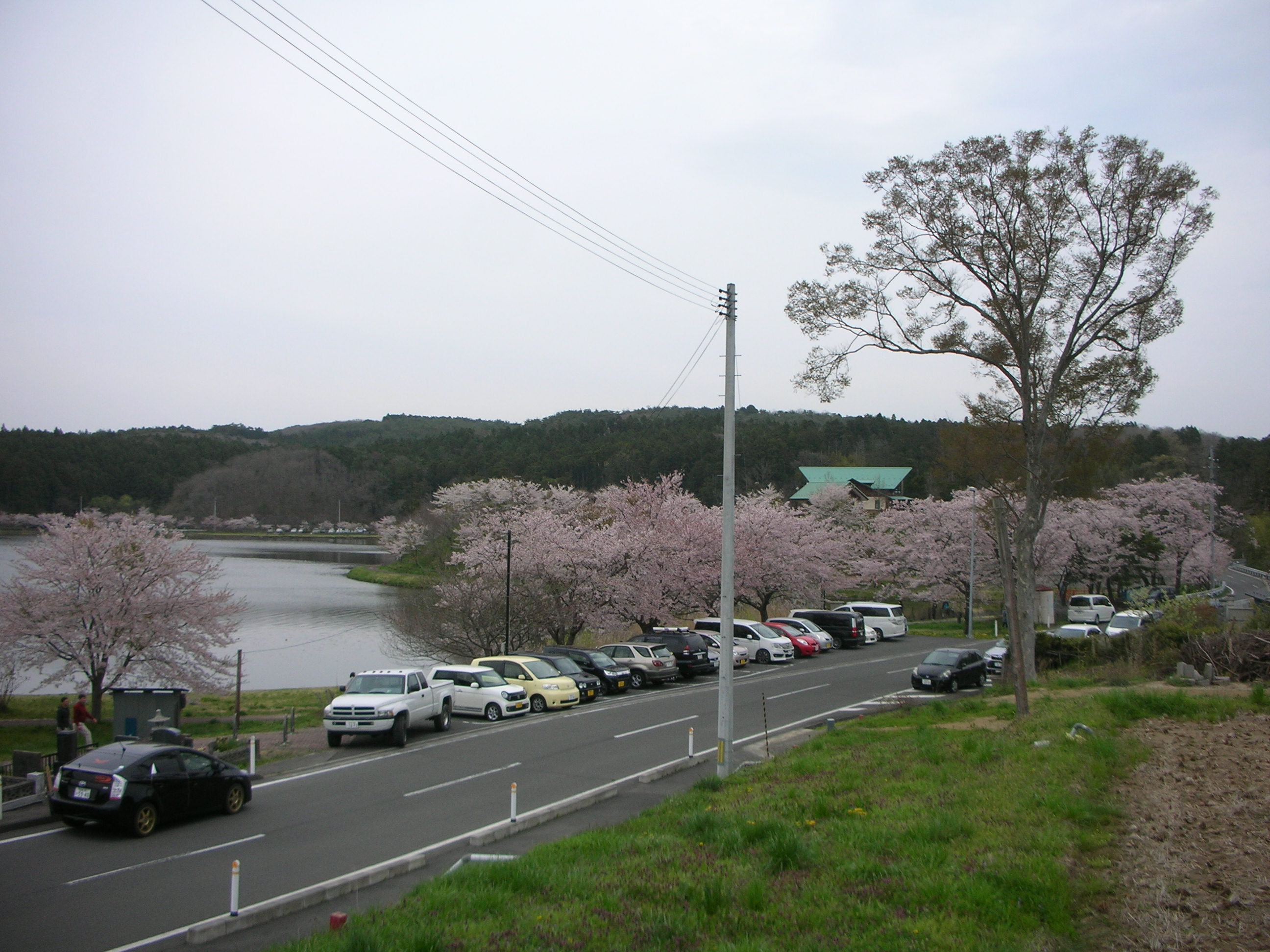 桜まつり 豊里側